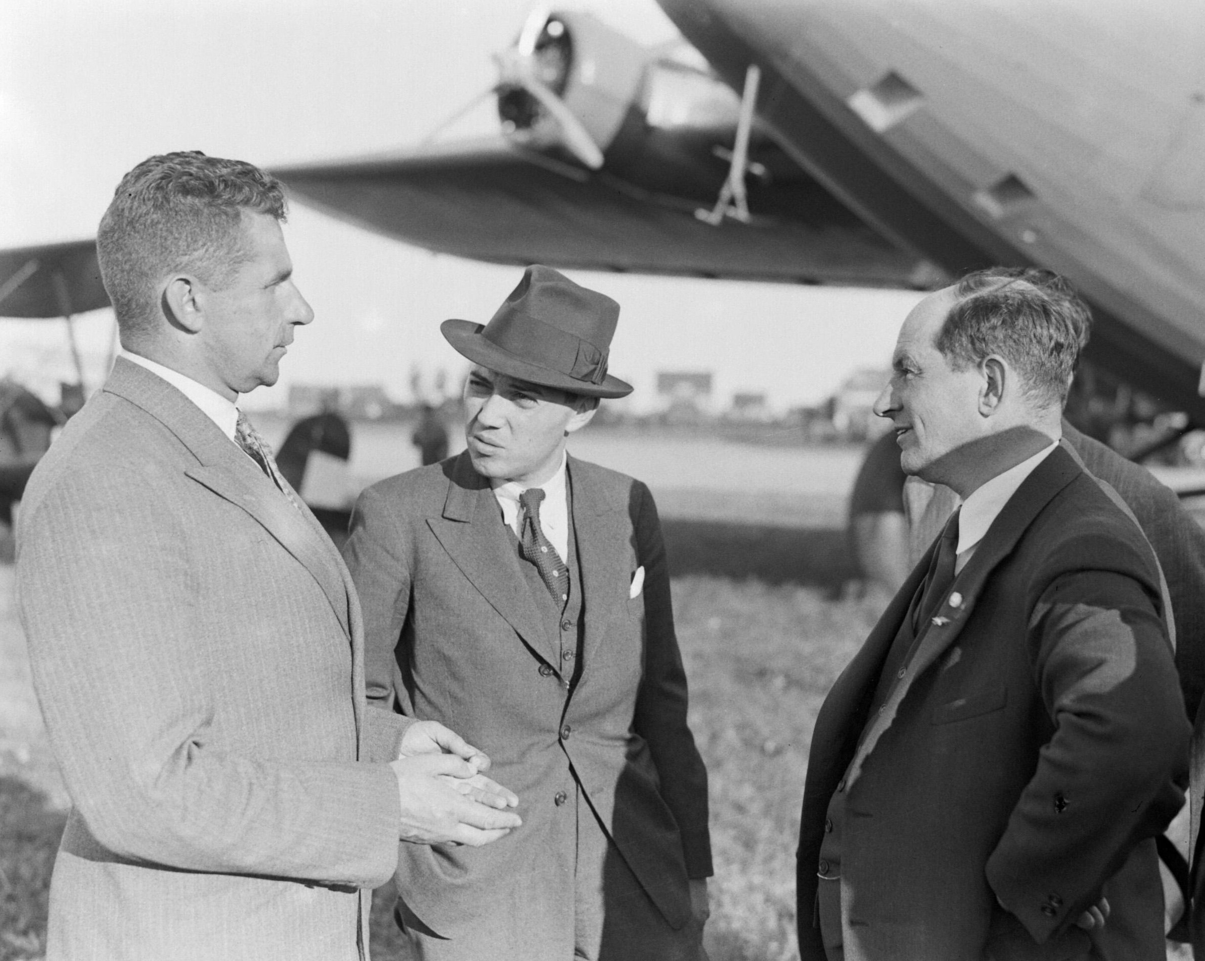 Vliegtuigbouwer Anthony Fokker (rechts) in gesprek met de heer Alksins chef van de Russische luchtmacht (uiterst links) op de achtergrond een Fokker F XXXVI passagiersvliegtuig op de luchthaven Schiphol